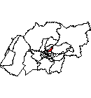 mapa del distrito de mariano melgar,Arequipa.